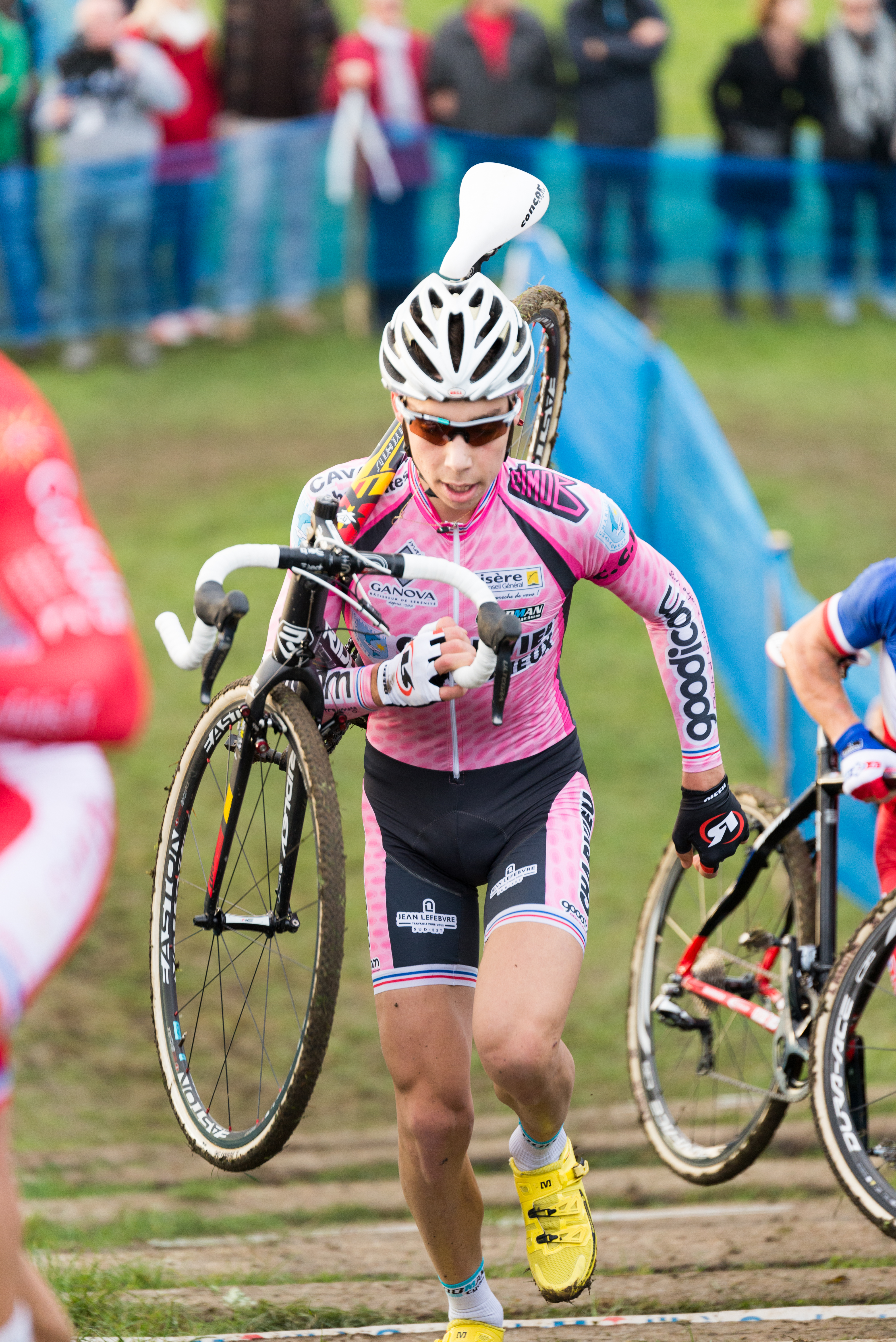 Clément RUSSO troisième de l'épreuve élite du 27ème cyclo-cross international de Dijon (Côte d'Or, France).